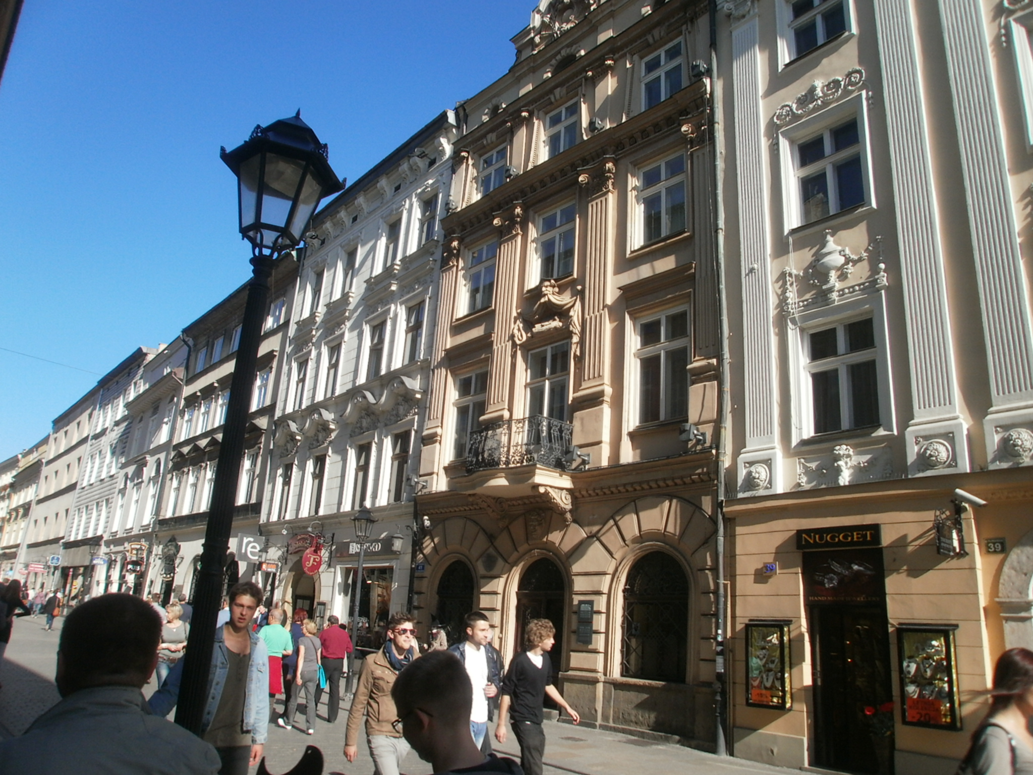 dom Jana Matejki, ob. muzeum. Kraków, ul. Floriańska 41.